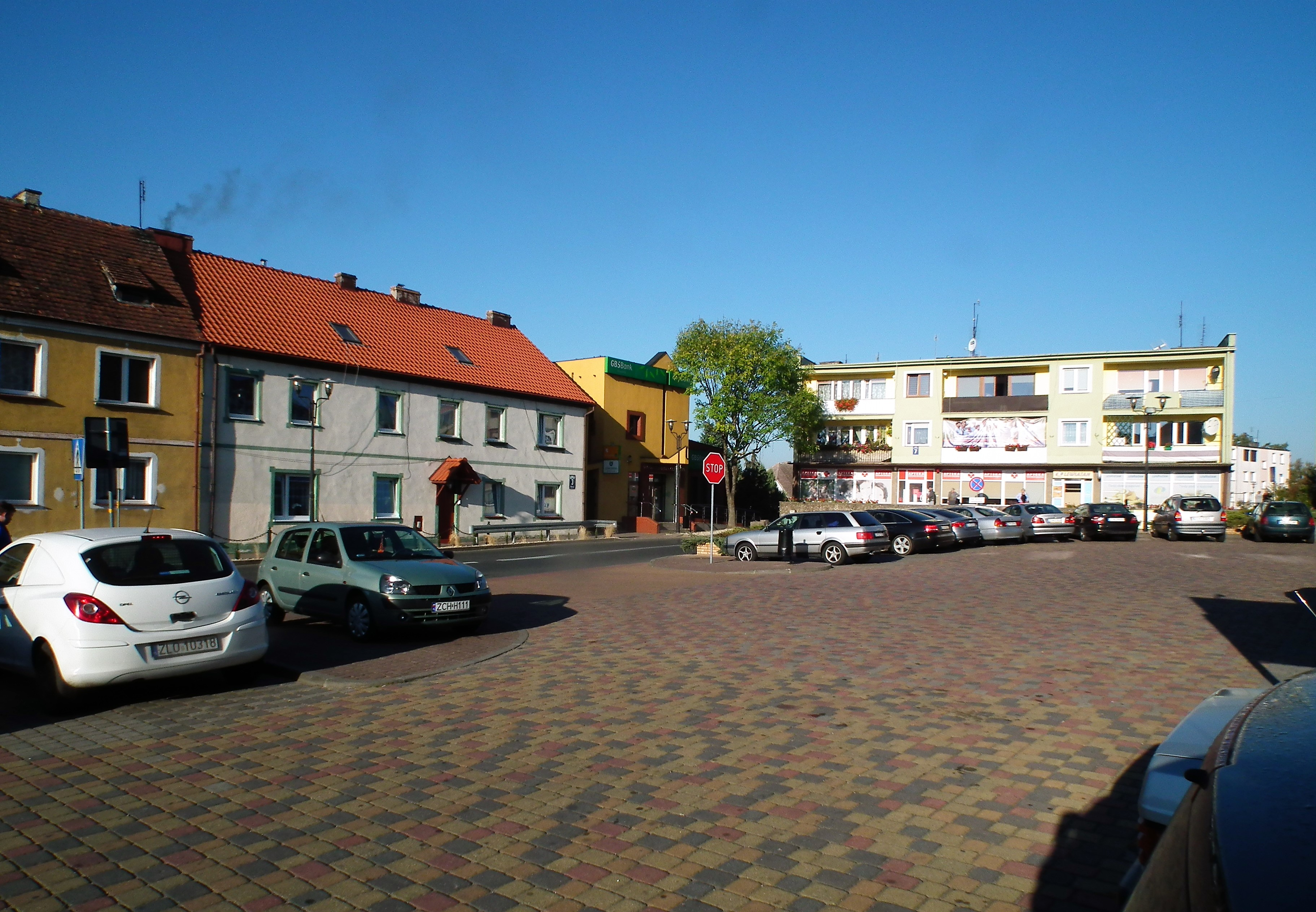 Centrum Pełczyc.